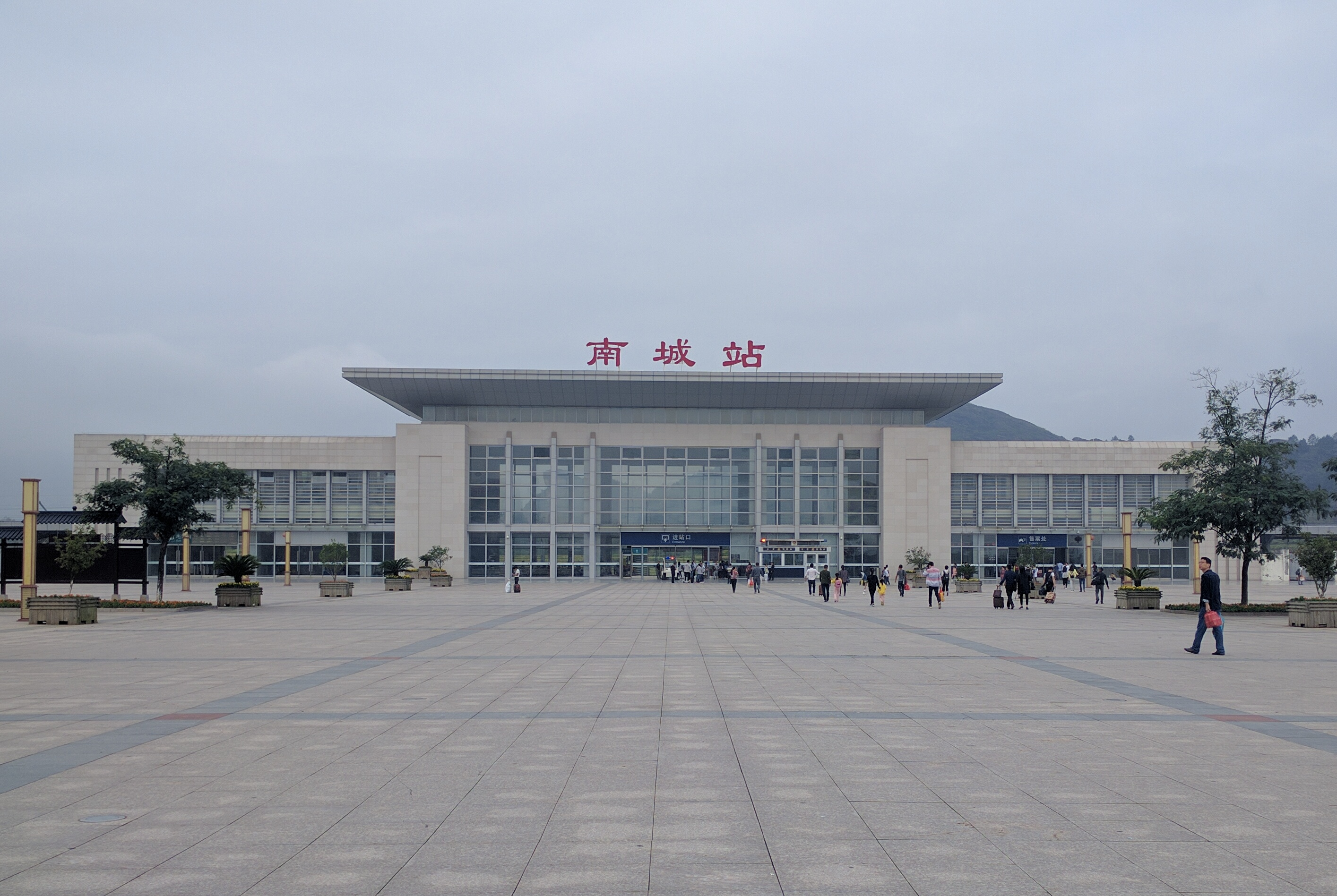 南城站站房和站前广场